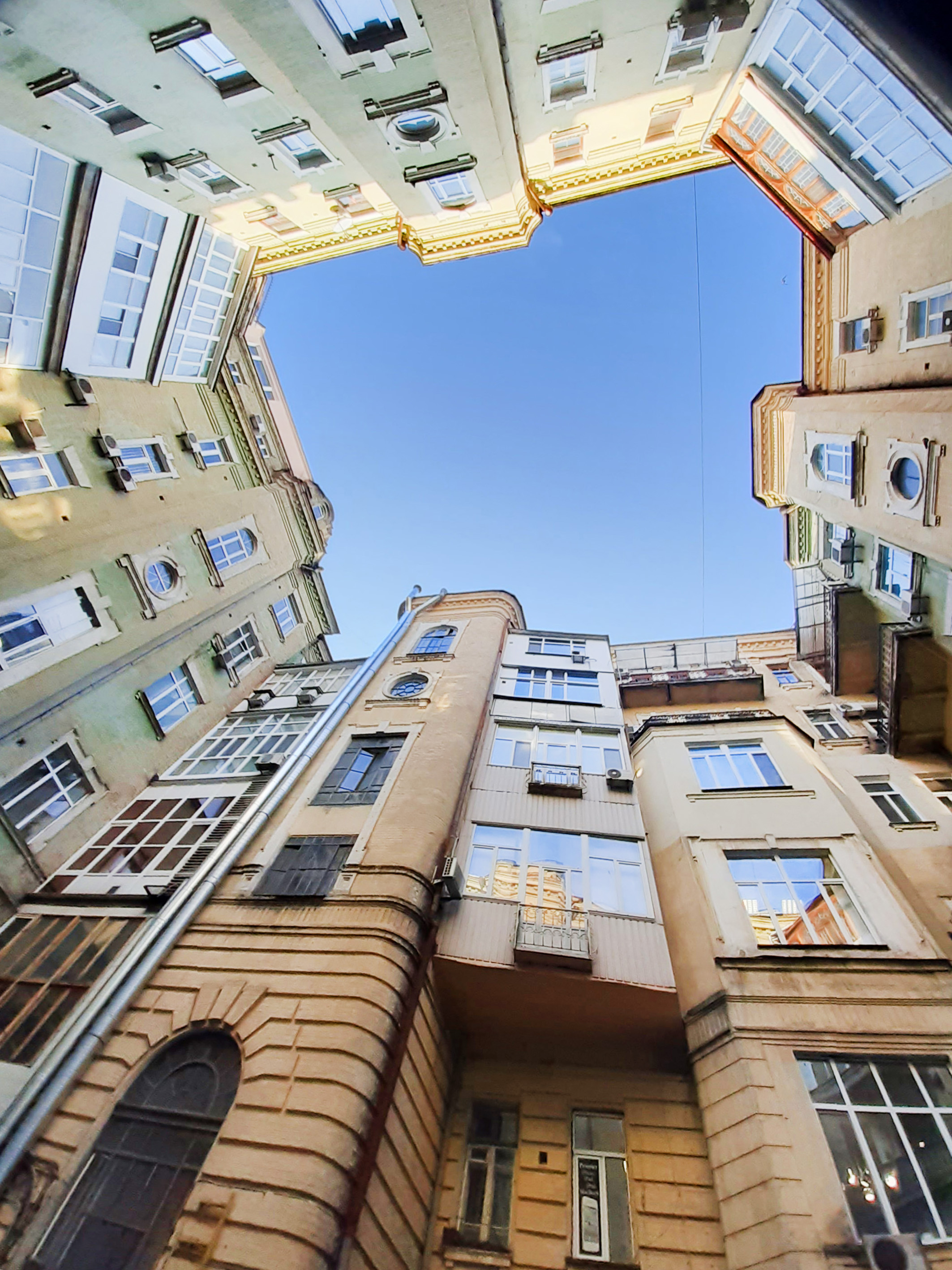 Будинок Крушевської, Київ, вул. Б. Хмельницького, 32